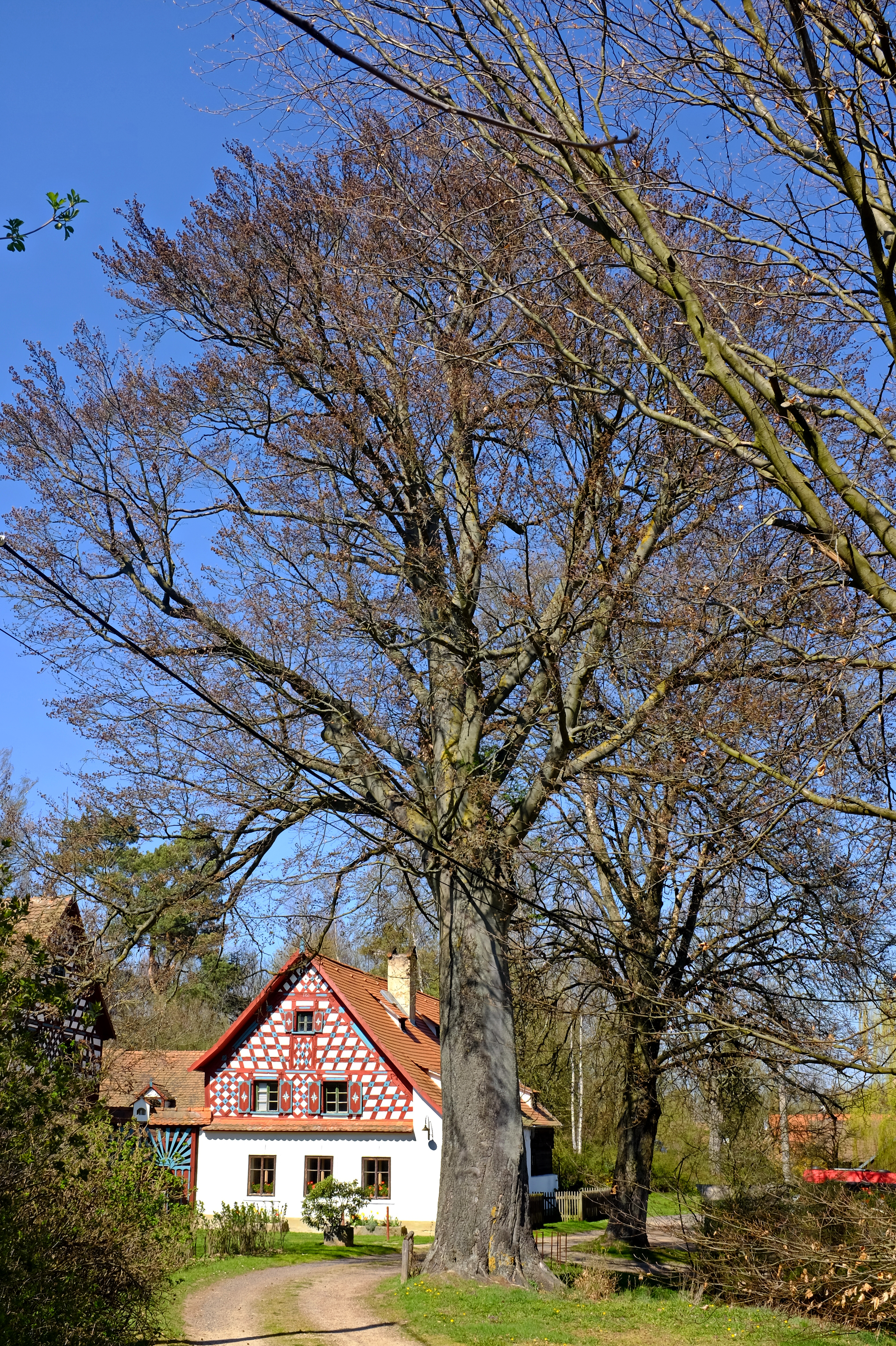 Památný strom - Doubravský buk - okres Cheb